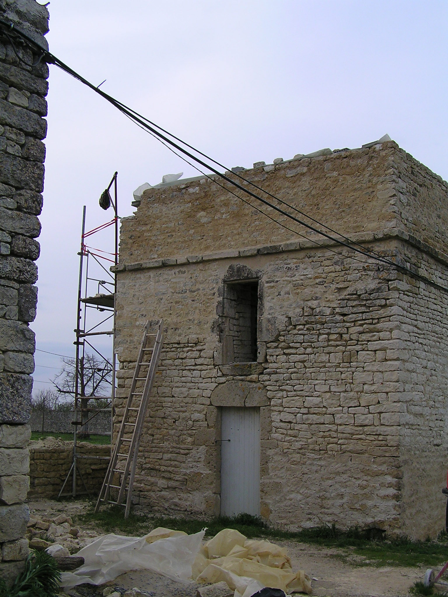 pigeonnier du château de villeneuve la Comtesse